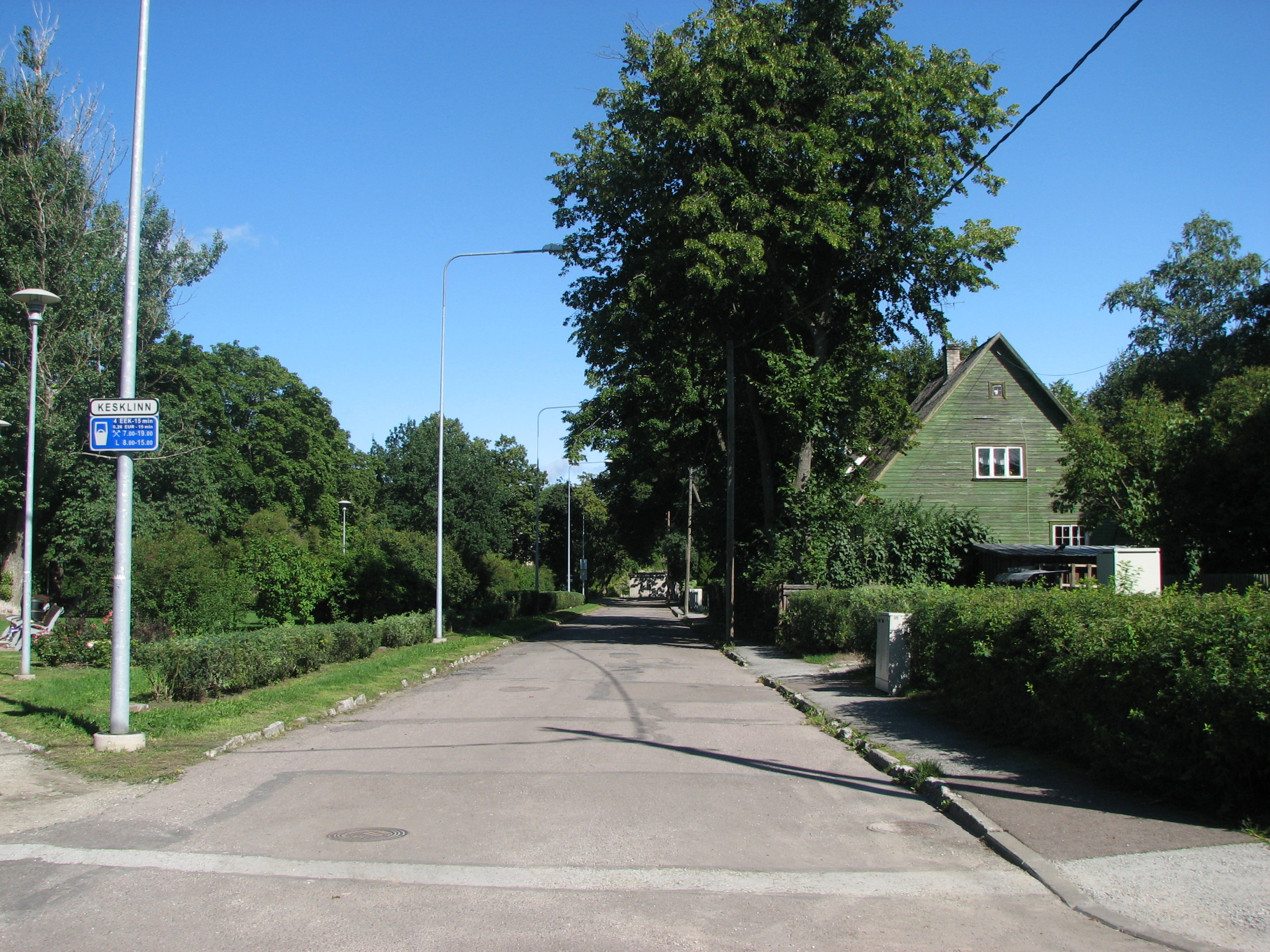 Vaade Vaiksele tänavale Kodu tänava poolt